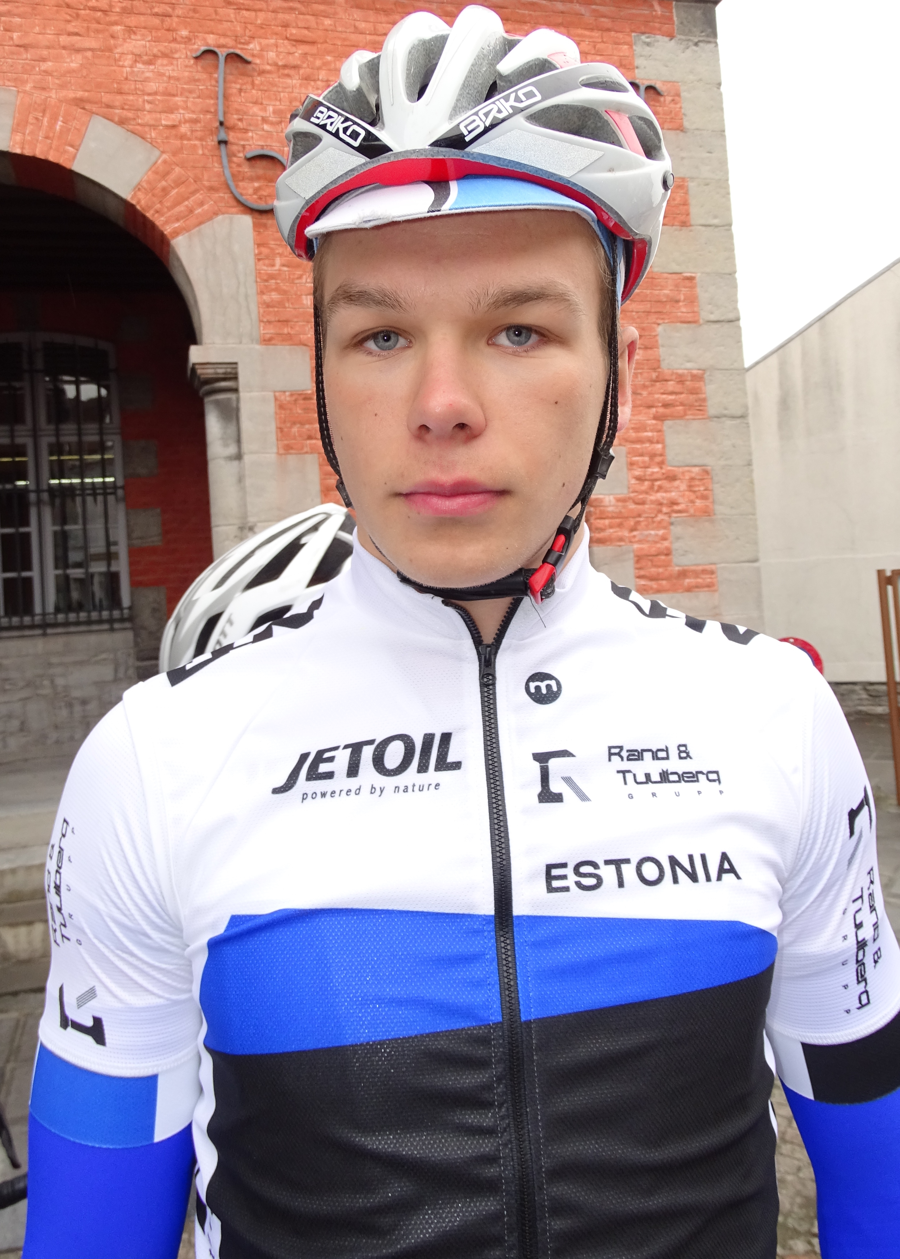 Triptyque des Monts et Châteaux 2015 Depicted person: Norman Vahtra Depicted team: Équipe nationale d'Estonie espoirs